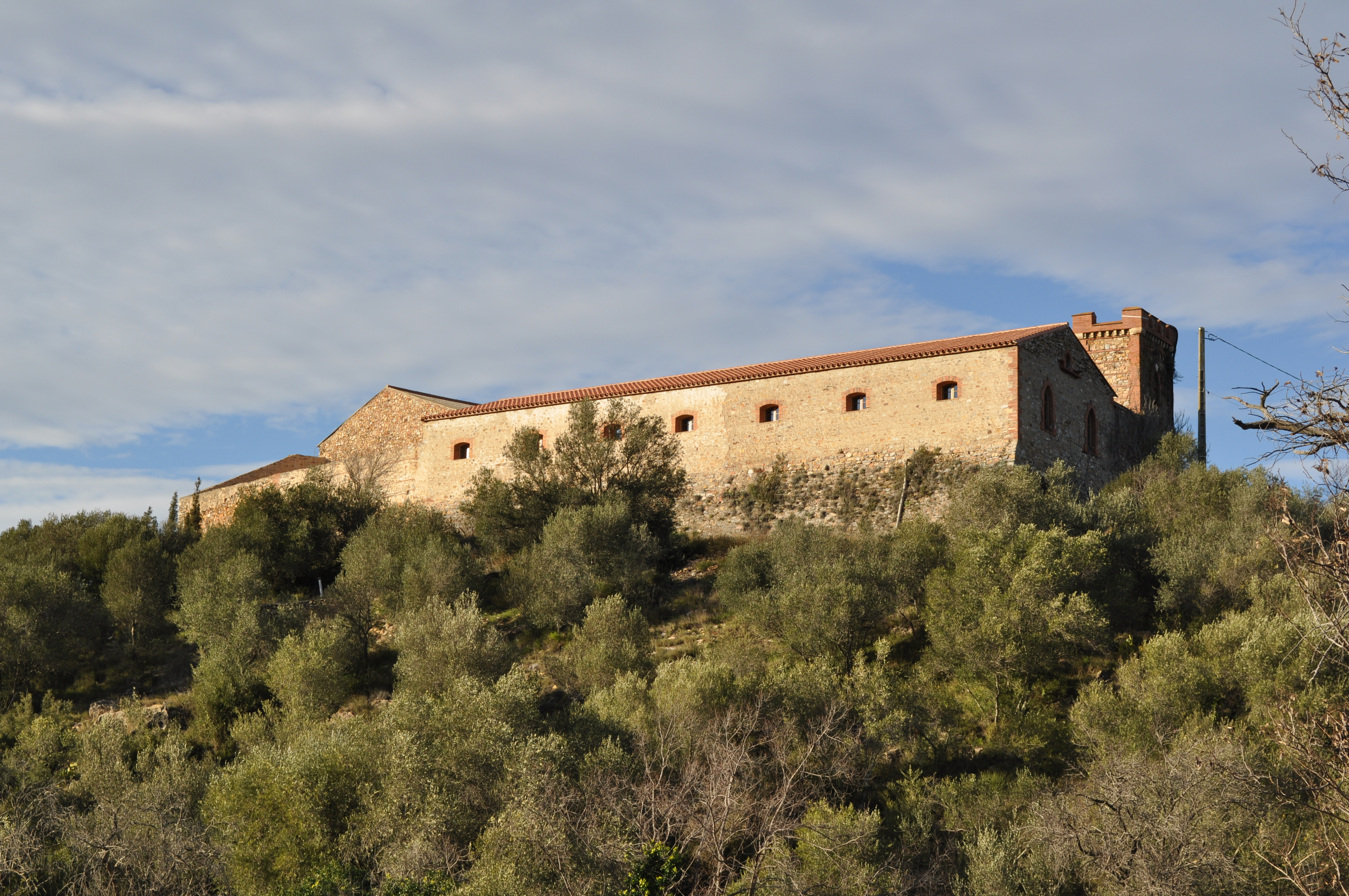 Mas de Las Fons, (Inscrit, 1993) .